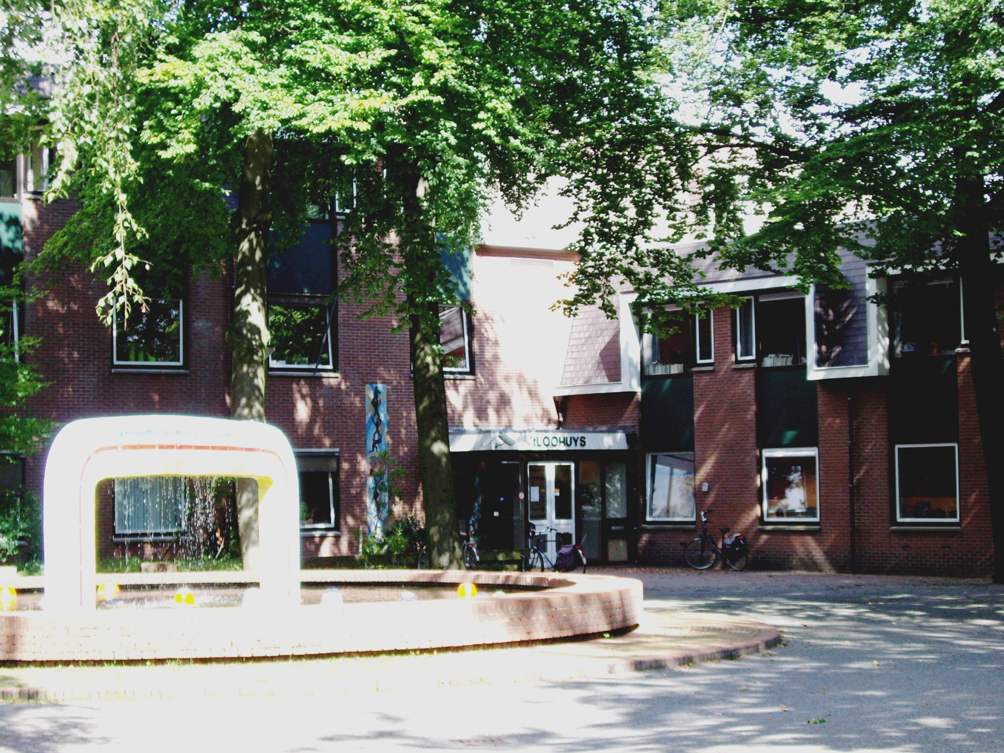 Regenboogbrink Groot Schuylenburg met Loohuys 2007